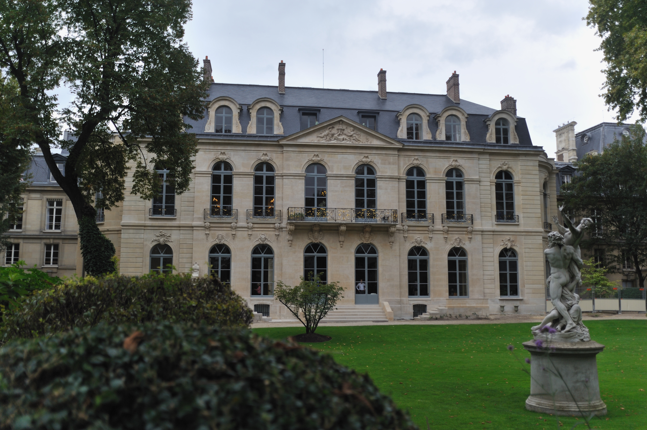 Hôtel de Villeroy (ministère de l'Agriculture), 78 rue de Varenne, Paris, France : façade sur le jardin Photo prise à l'occasion des journées européennes du patrimoine 2011